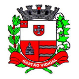 Brasão de Armas do município paulista de Gastão Vidigal.